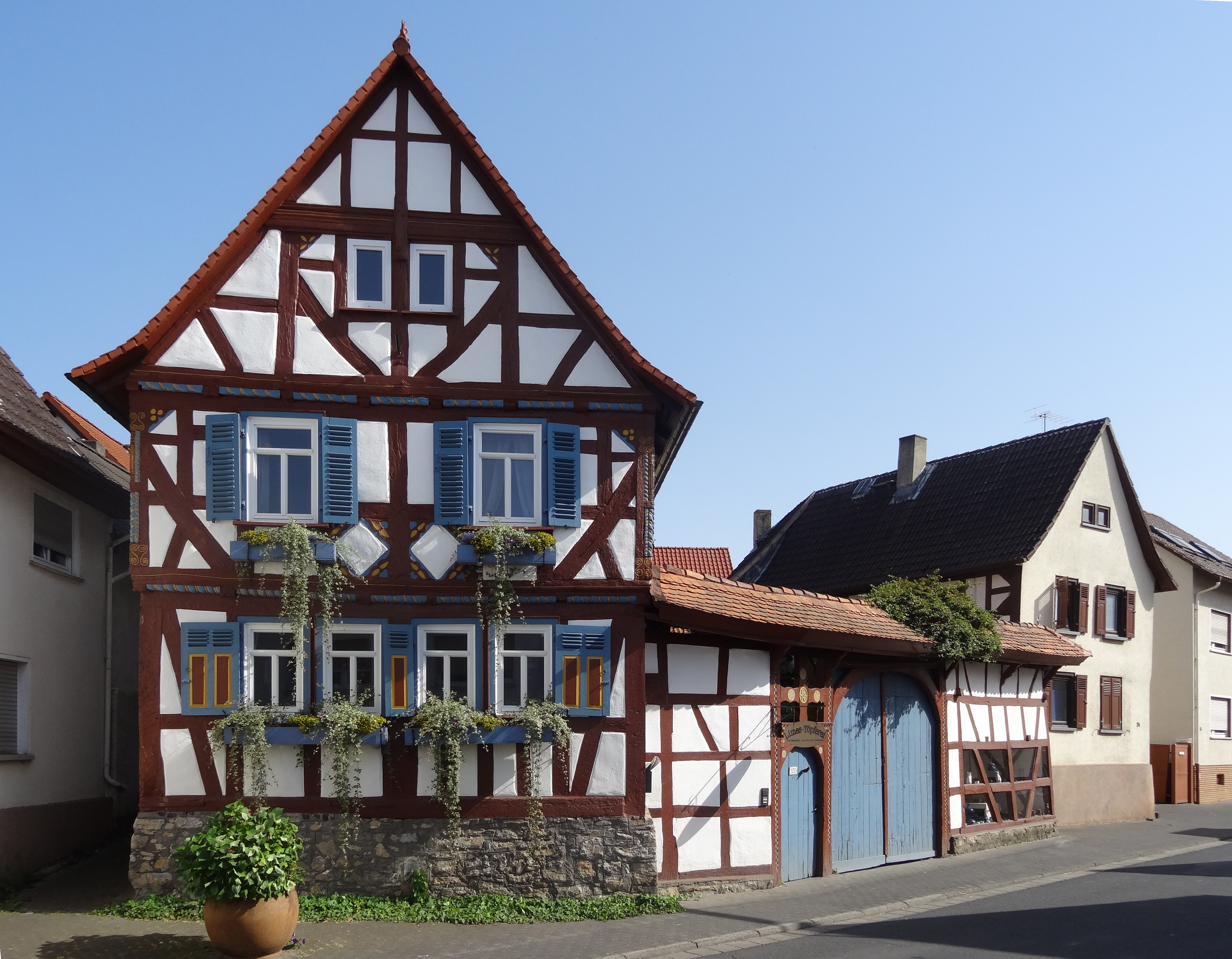 Fachwerkwohnhaus Obergasse 32 (Lang-Göns)